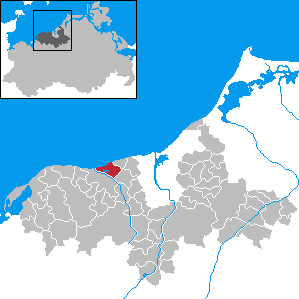 Börgerende-Rethwisch in Mecklenburg-Western Pomerania - District Bad Doberan